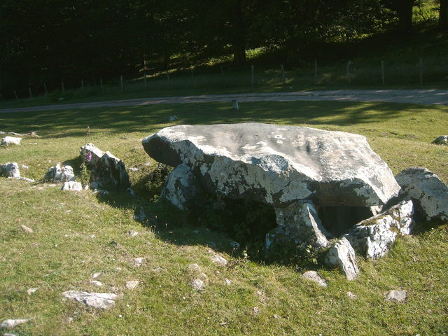 Jentilarri harrespila, Aralar mendilerroa